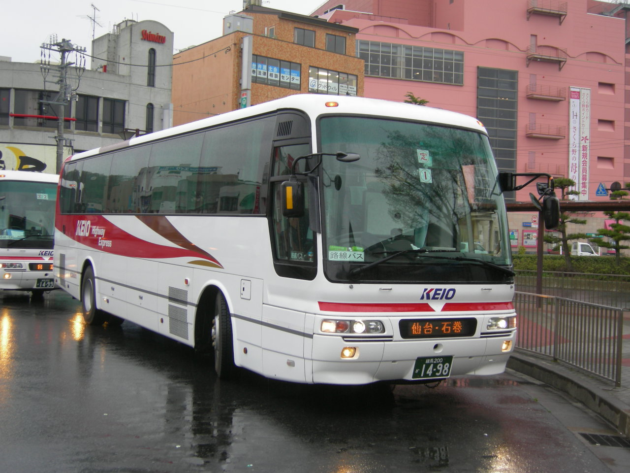 京王電鉄バス(Keio-dentetsu bus)三菱PJ-MS86JP 新宿 - 仙台・石巻間高速バス（広瀬ライナー号）で使用 社番：K50601 登録番号：練馬200か14-98